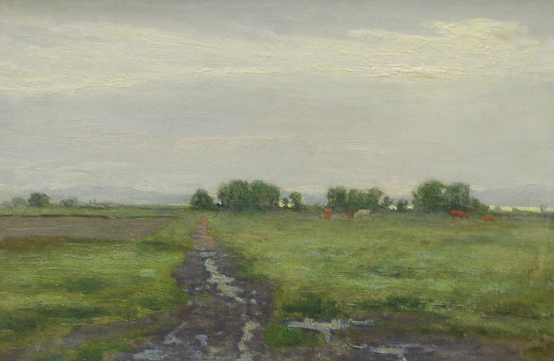 Springville Morning